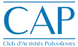 Club d’Activités Polyvalentes est un club d’étudiants de l’École Nationale Polytechnique.